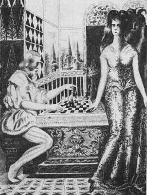 Paolo Boi hag an diaoul.